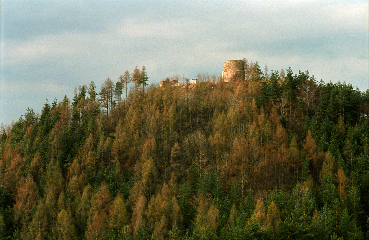 Rytro